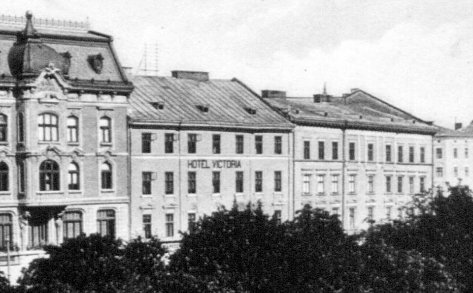 Львів, пр.Свободи